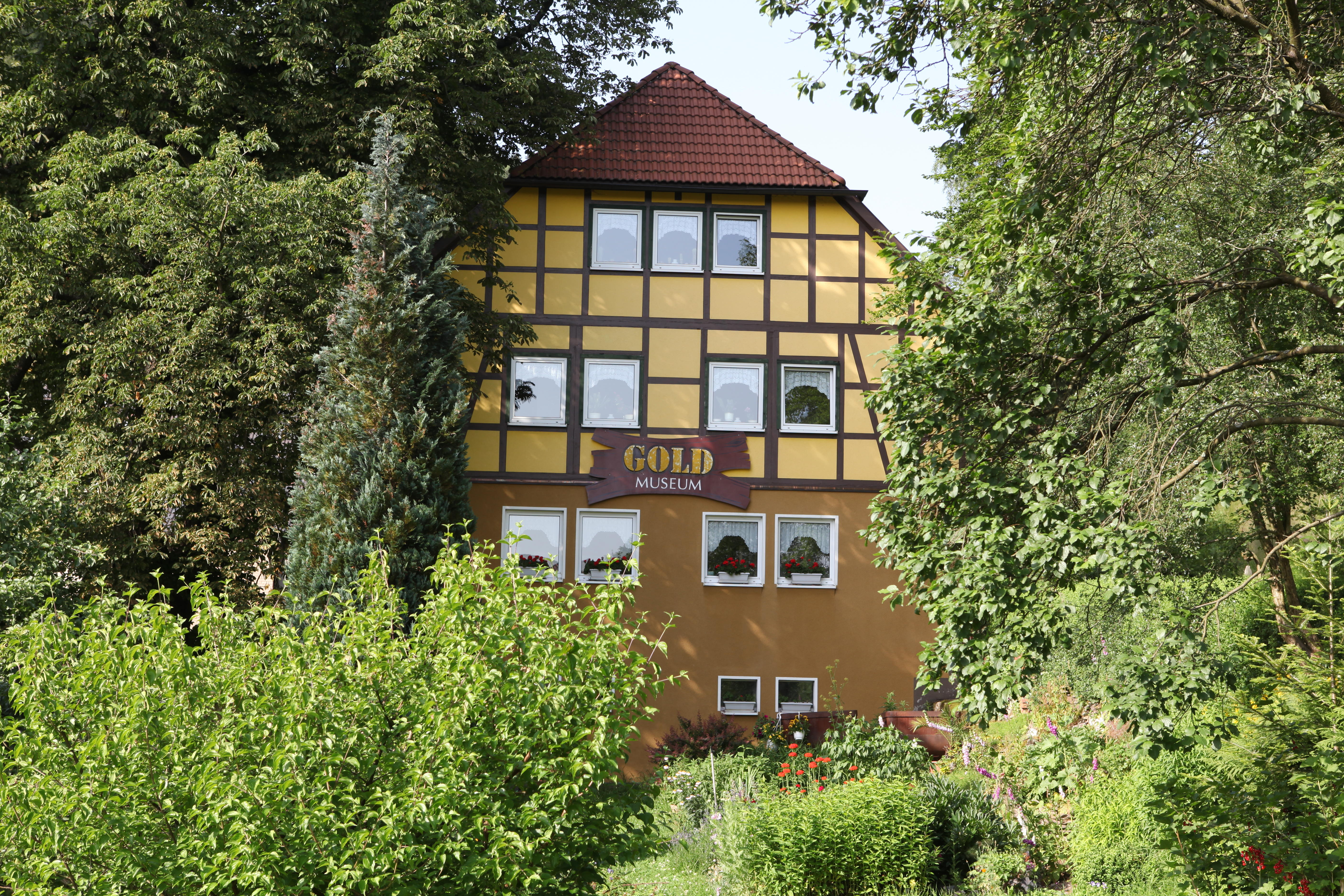 Goldmuseum in Theuern, OT von Schalkau, Thüringen